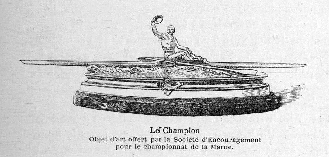 Trophée du championnat d'aviron de la Marne, au XIXe siècle. page 95.